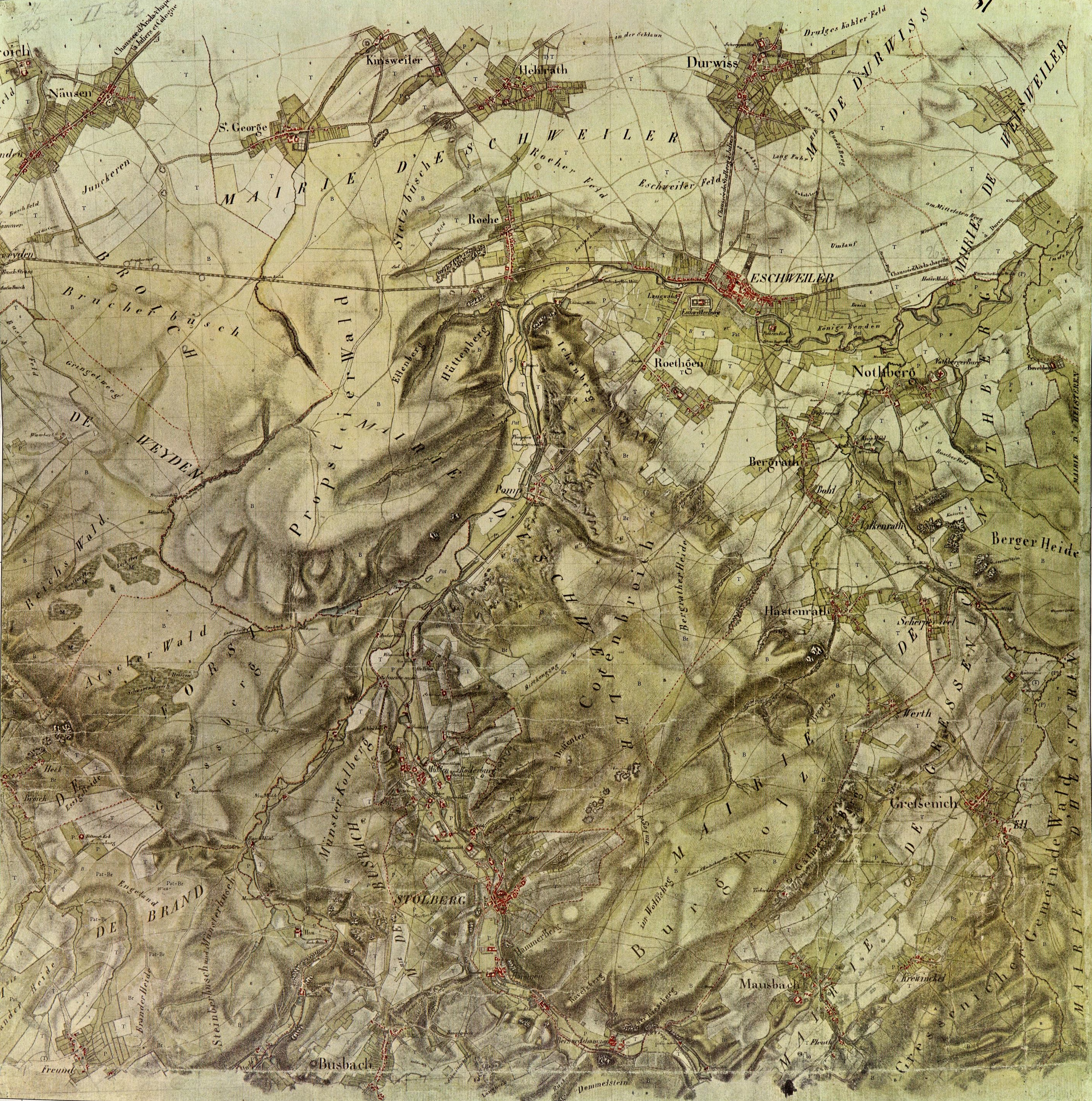 Kartenaufnahme Tranchot Karte 87, Eschweiler